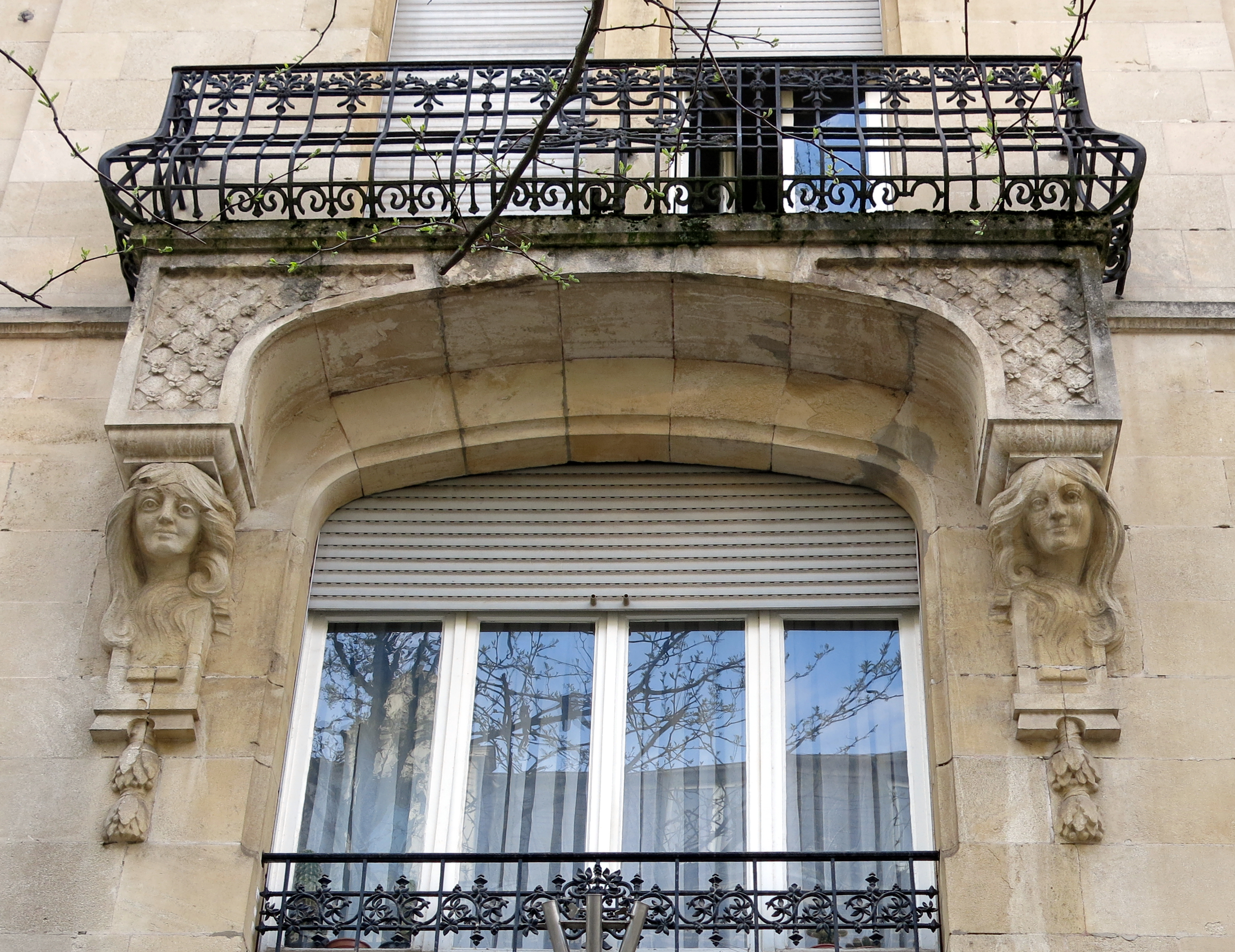 Op Nummer 96 an der Uelzechtstrooss zu Esch.